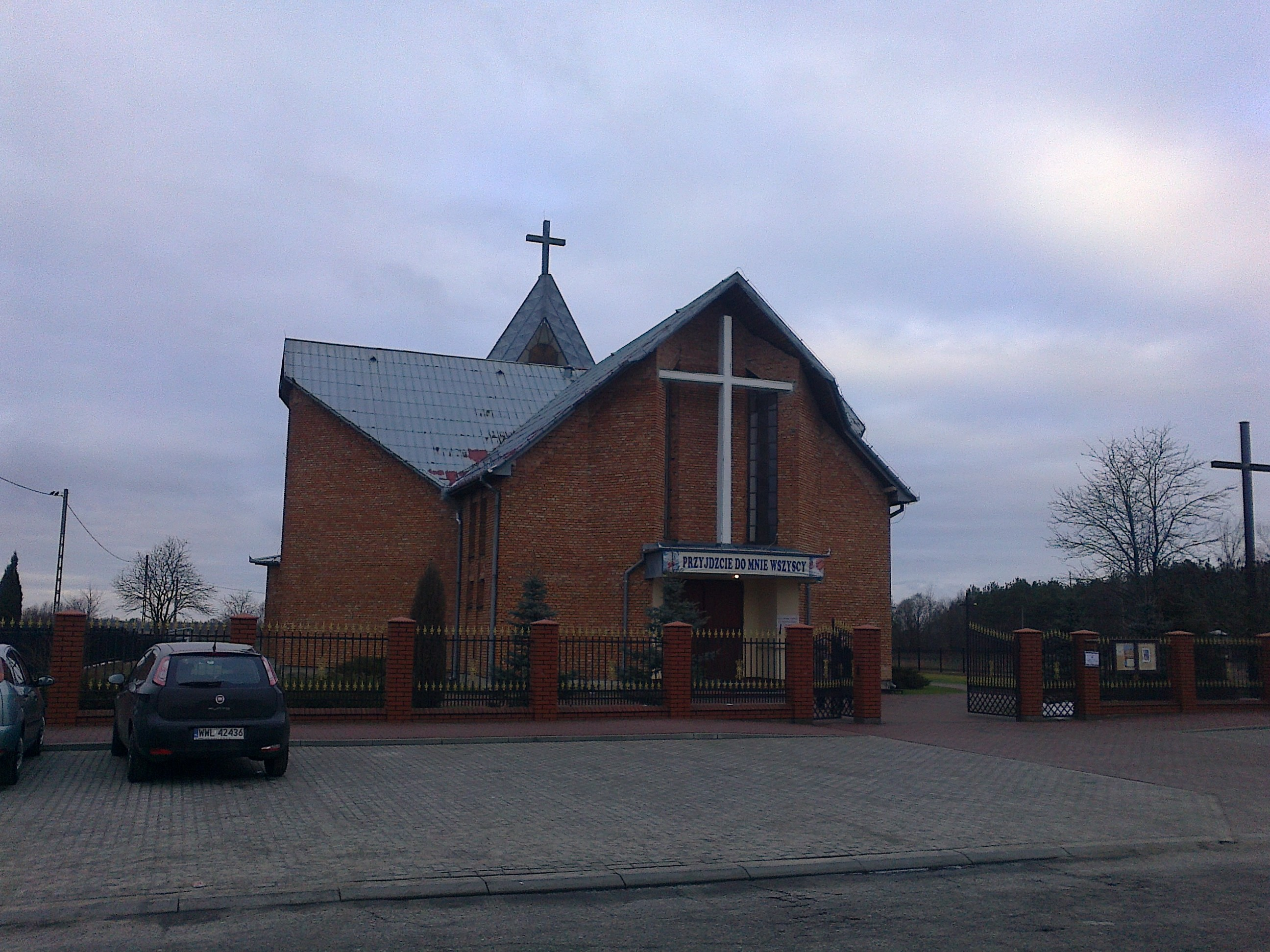 Józefów - kościół Miłosierdzia Bożego